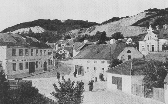 Obersievering with restaurant "Zur Agnesgasse" 1910 (Sievering)